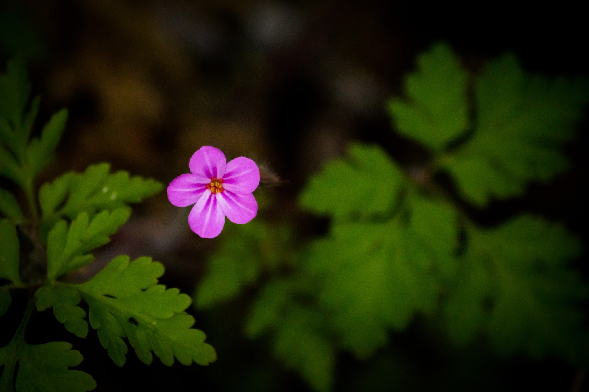 Kakost smrduty, Praha - Holesovice